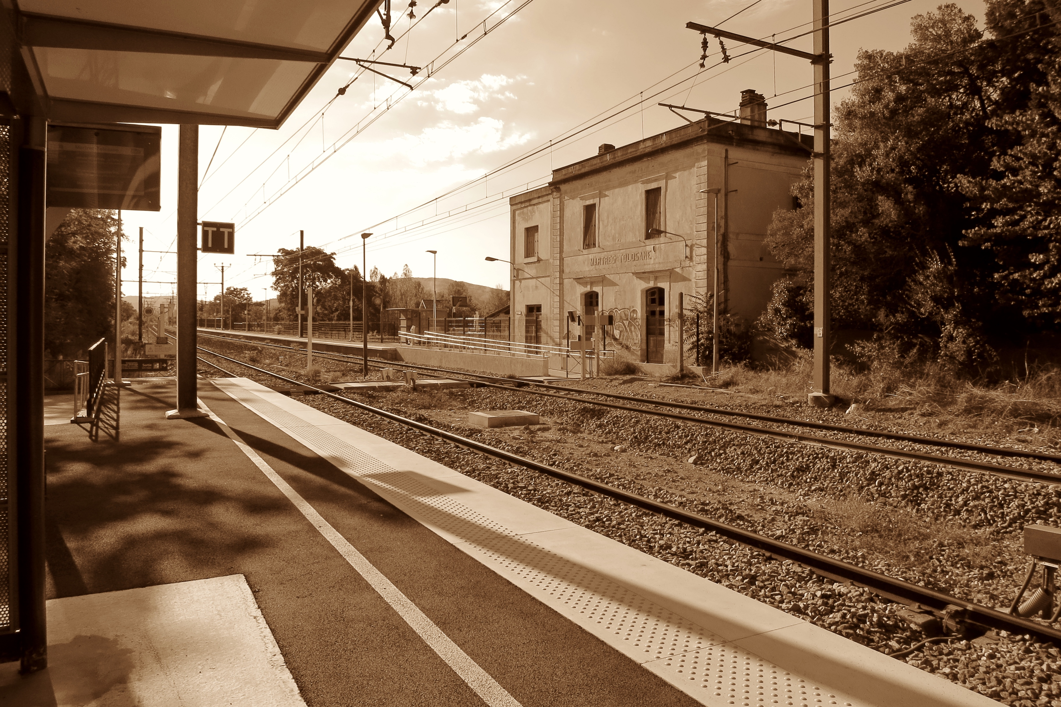 Martres-Tolosane (Haute-Garonne, France) - Gare de Martres-Tolosane.